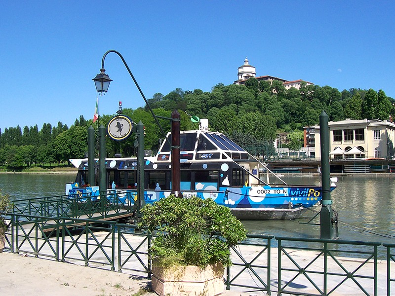 Torino - Battello sul fiume Po